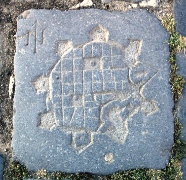 Piatra din pavajul Pietii Unirii din Timisoara, gravata cu harta vechii Cetati.(autor necunoscut) Piatra a mai fost considerata si "Punctul 0" al Timisoarei.